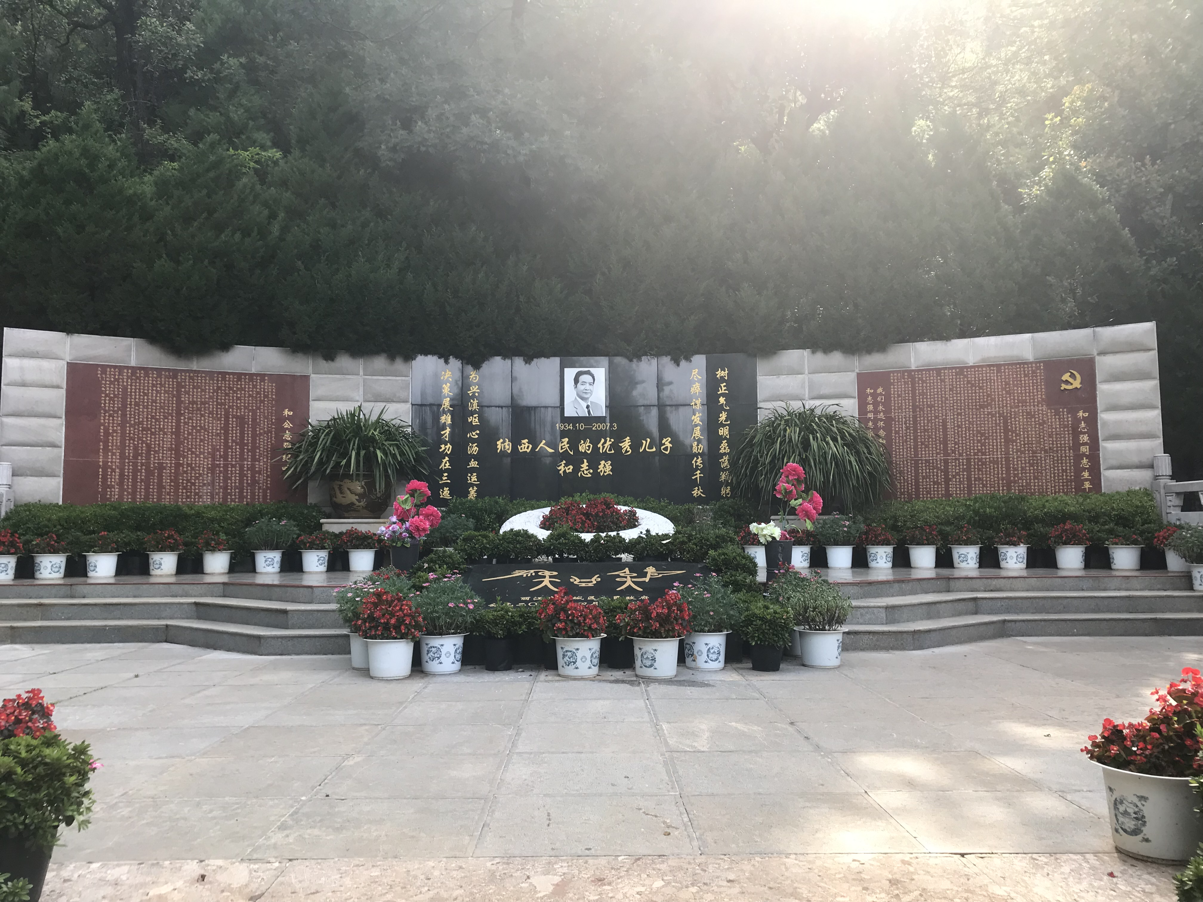 中文（中国大陆）: 丽江黑龙潭公园内的和志强墓